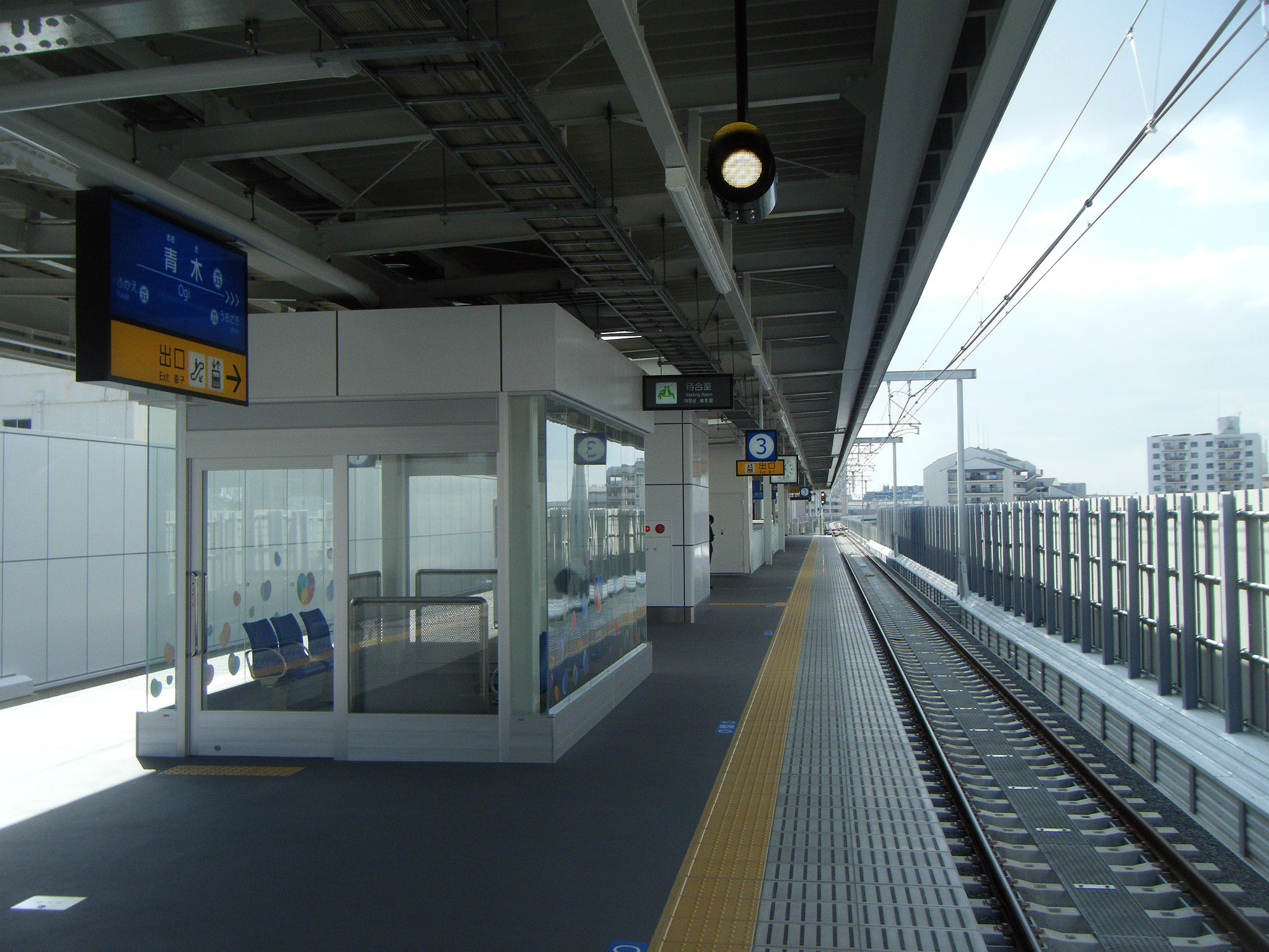 阪神青木駅 下り高架ホーム